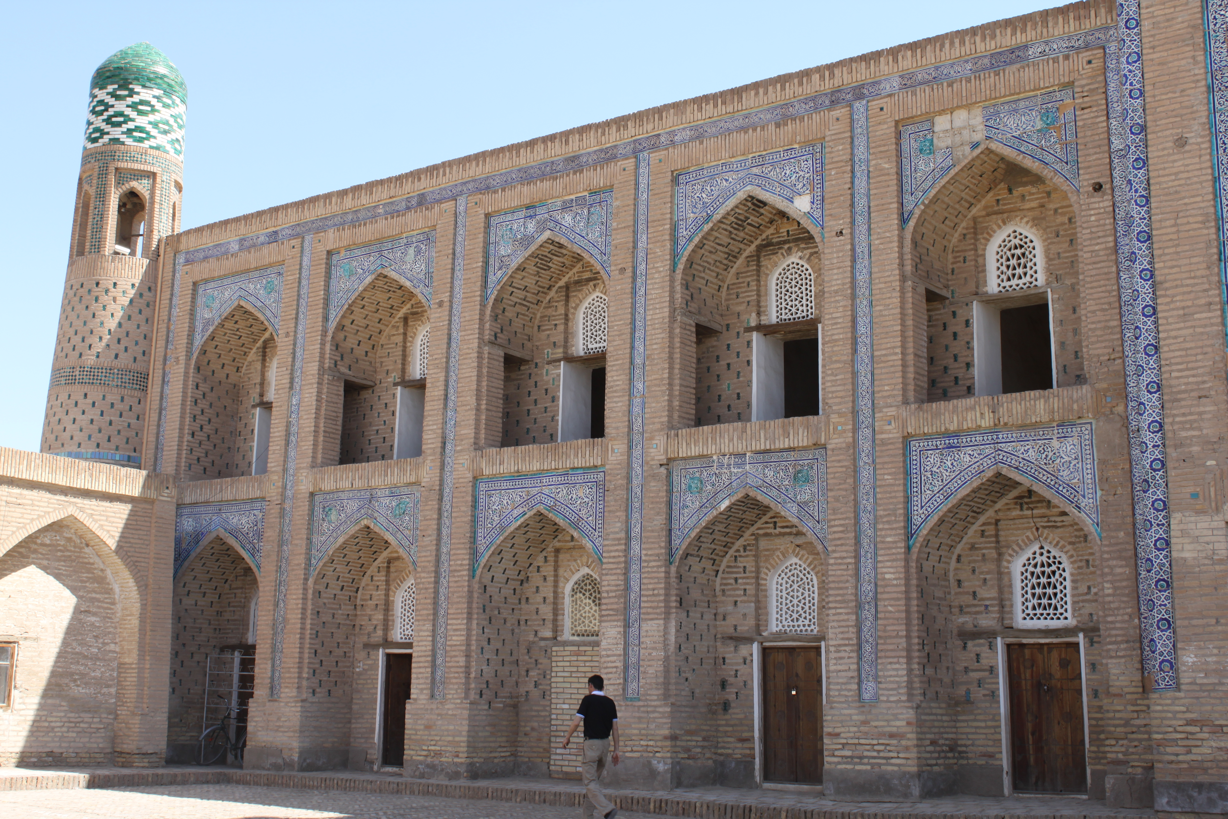 facade exterieure donnant sur l'avant cour, avec deux niveaux de cellules